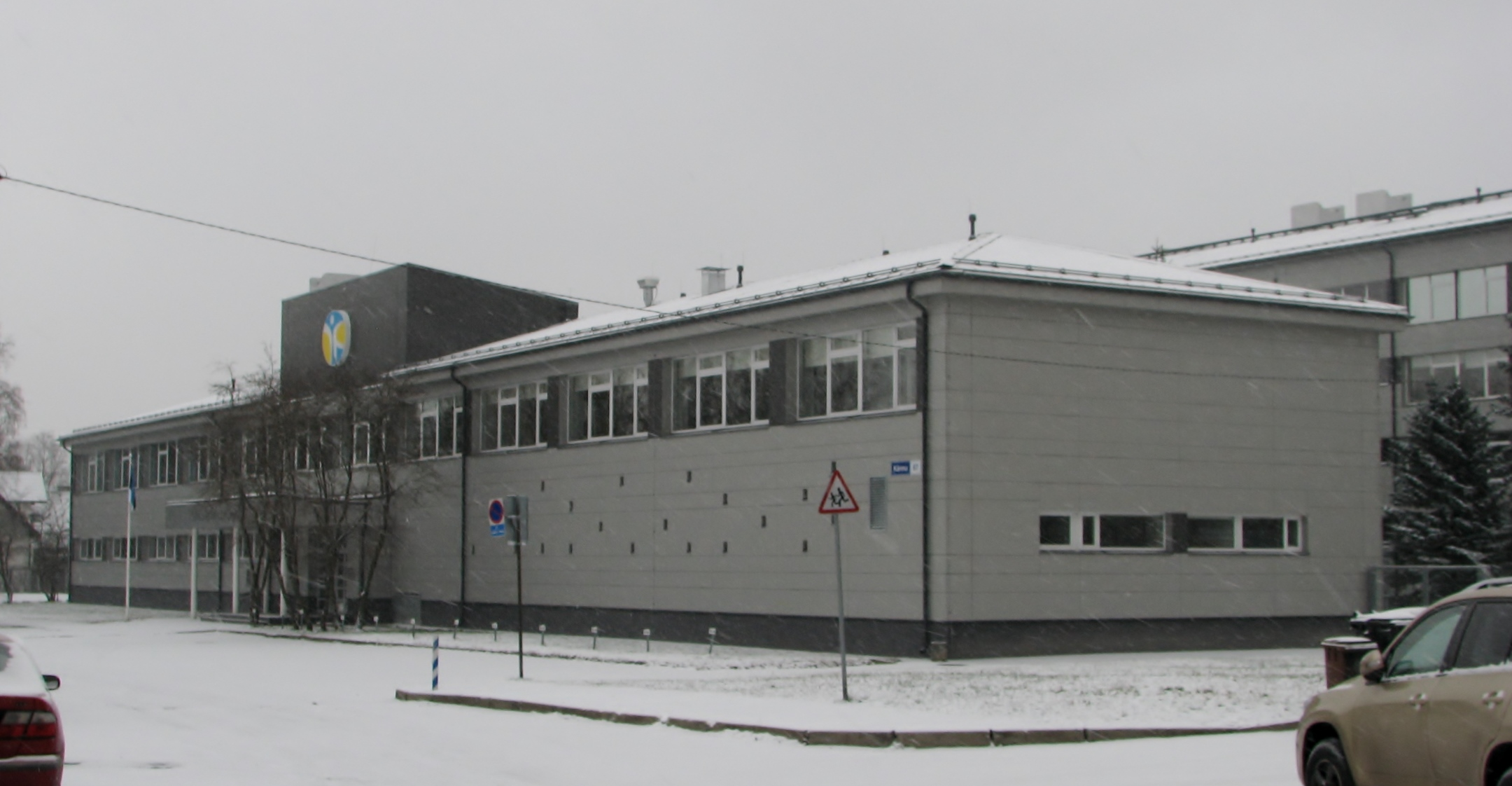 Tallinna Tervishoiu Kõrgkool aadressil Kännu 67